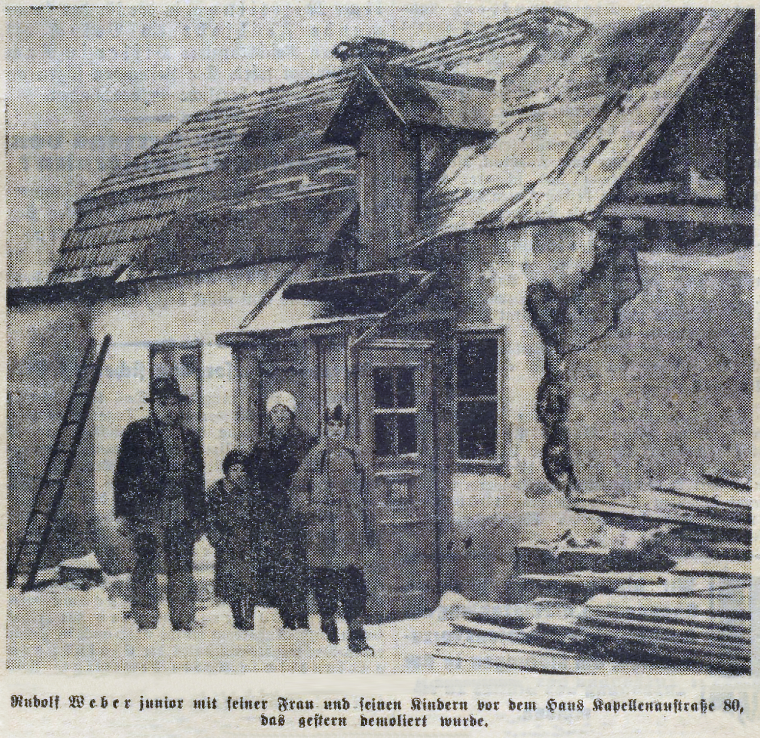 Wien, XXII., Kapellenaustraße 80; Abbruchhhaus im Bretteldorf, 1938